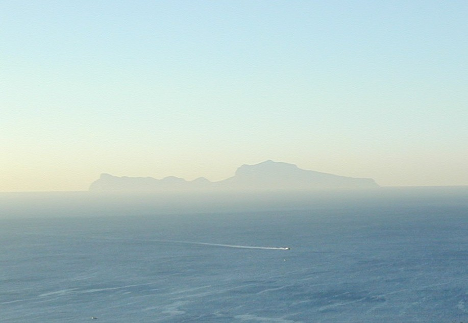 personal picture